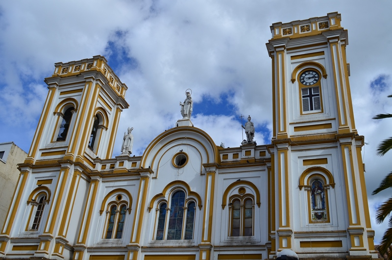 Catedral